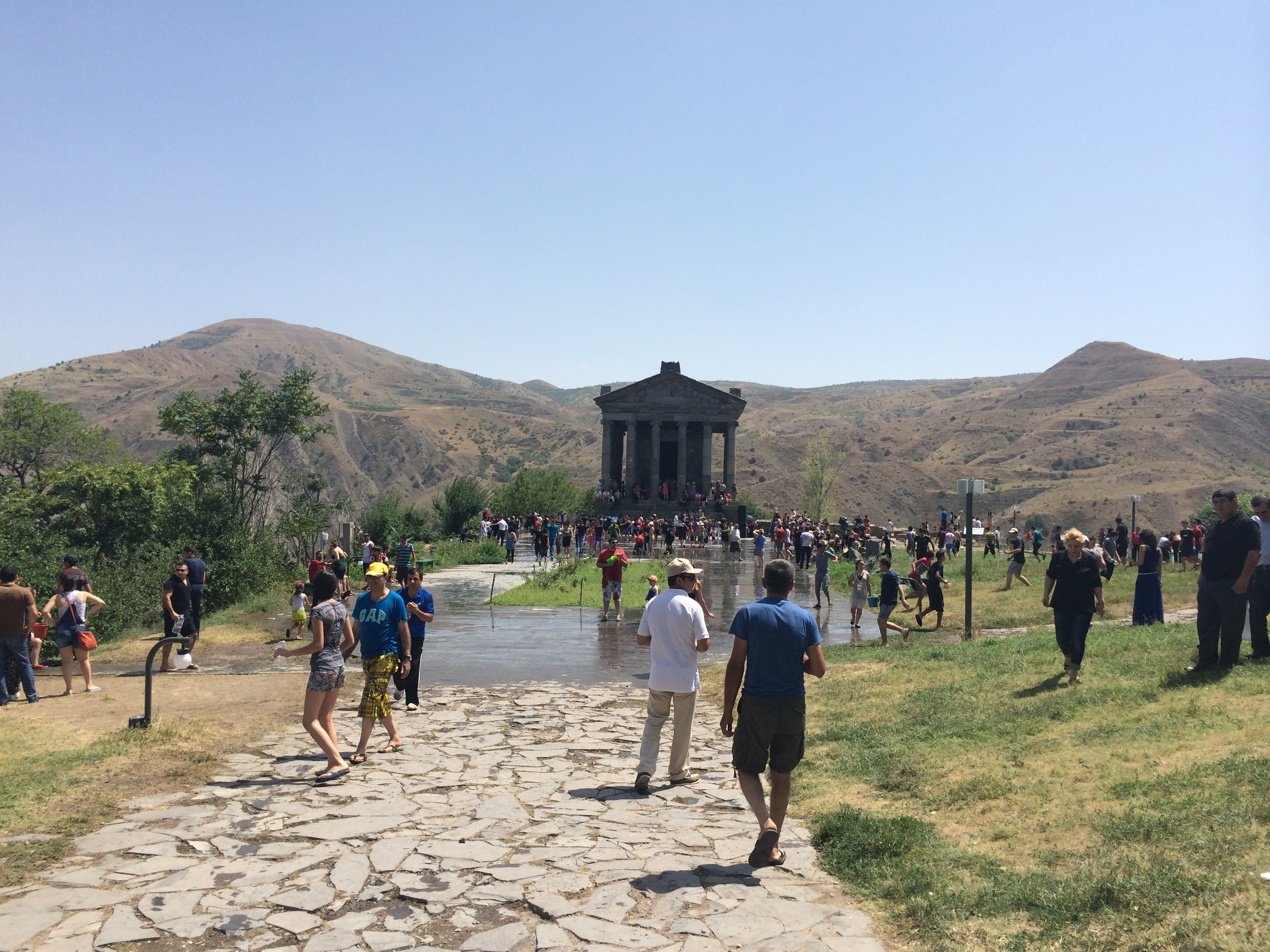 2014 թվականի Վարդավառը Գառնու Միհրի տաճարում։